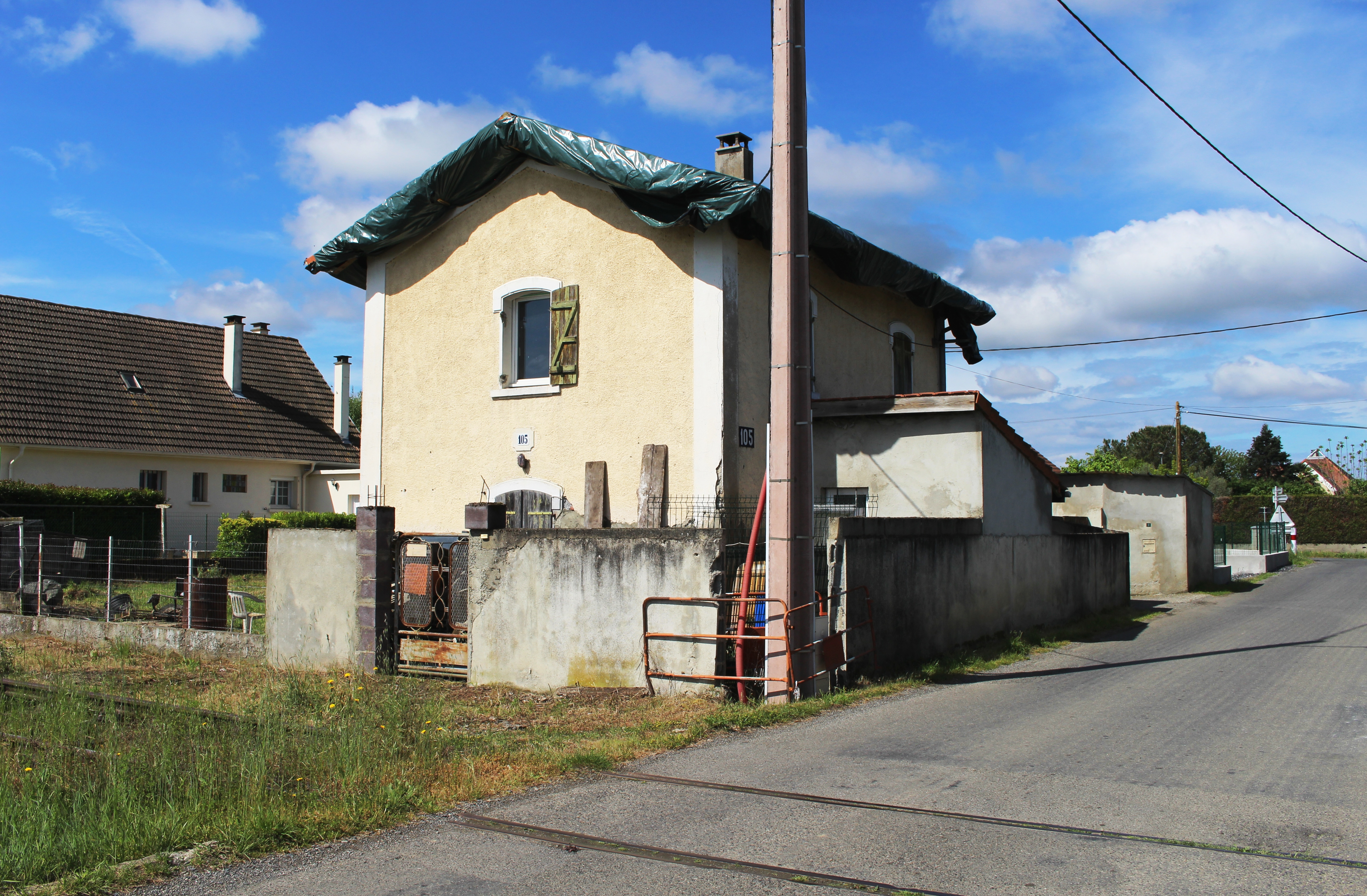 Passage à niveau de Salles-Adour (Hautes-Pyrénées)